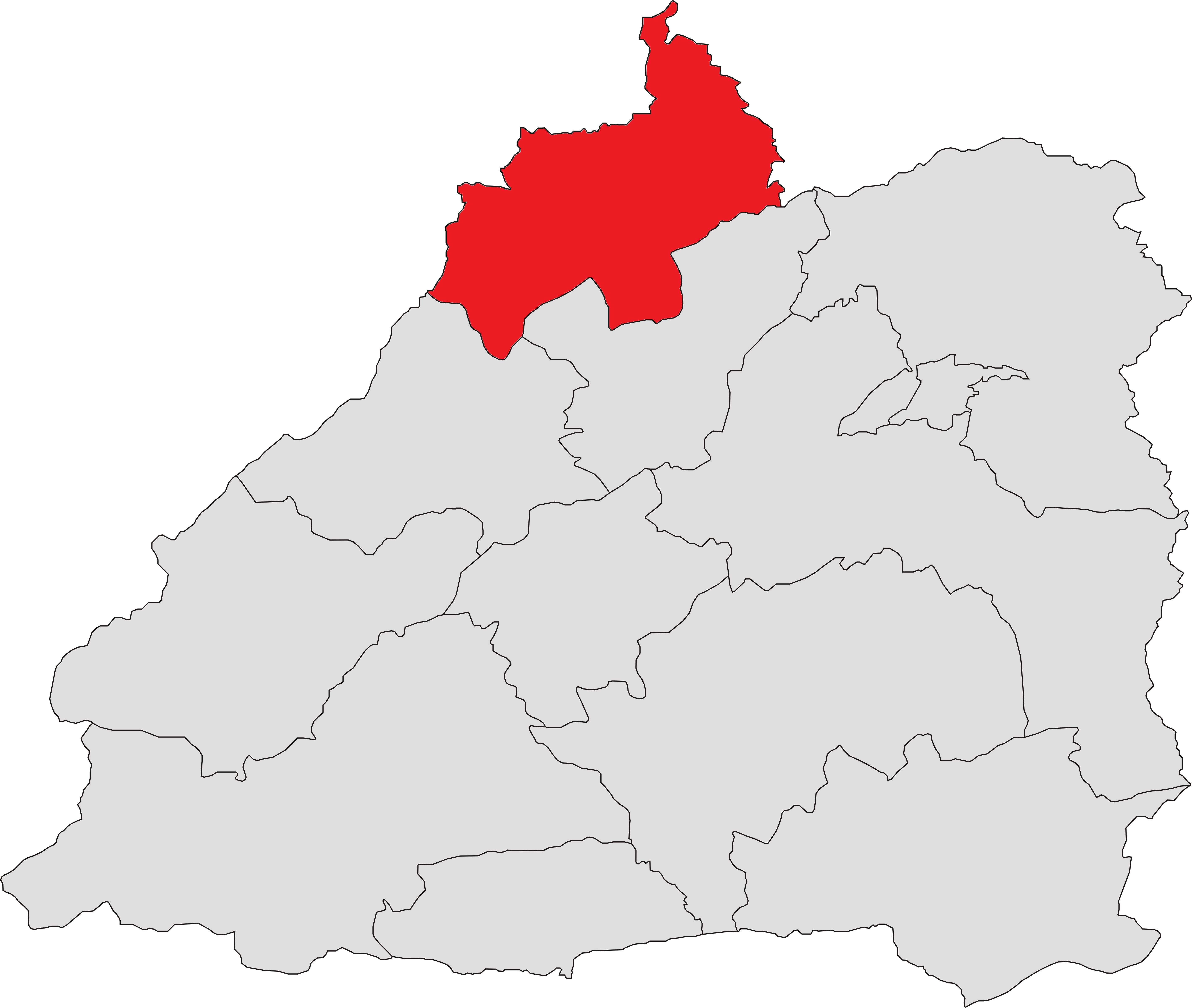 中文（中国大陆）: 芒市江东乡位置图